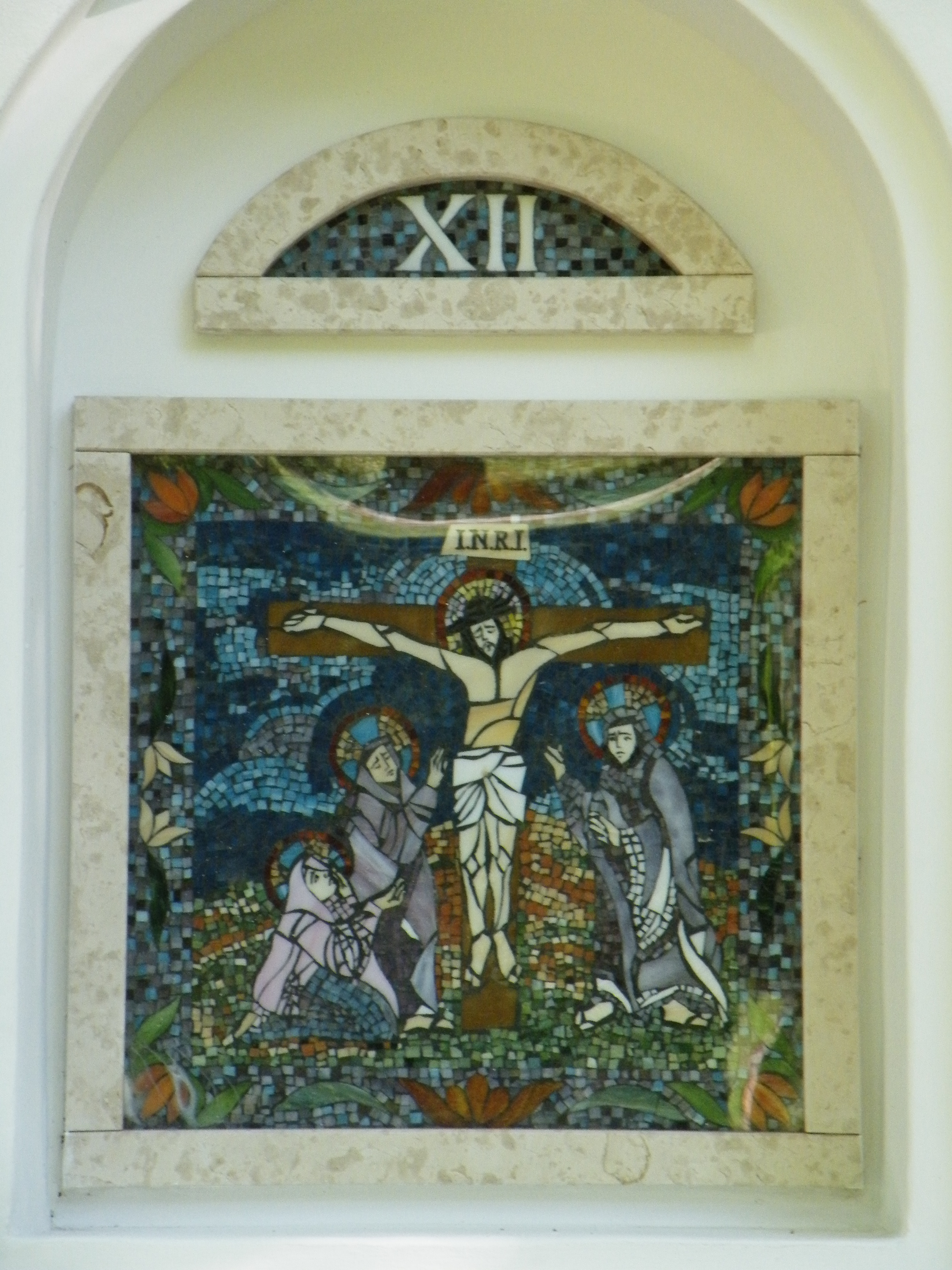 Stációk a Palóc ligetben, Balassagyarmaton